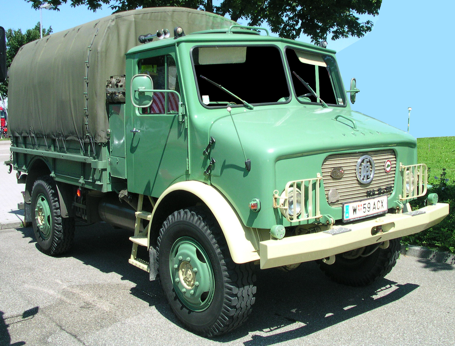 ÖAF Husar HA 2-90, Baujahr 1971, 4690 ccm Hubraum, 66 kW (90 PS), gesehen in Wörth am Rhein beim Oldtimer-Treffen bei Daimler-Chrysler